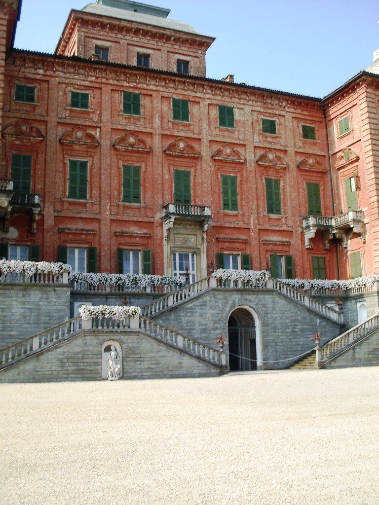 Facciata nord del castello, XVII secolo